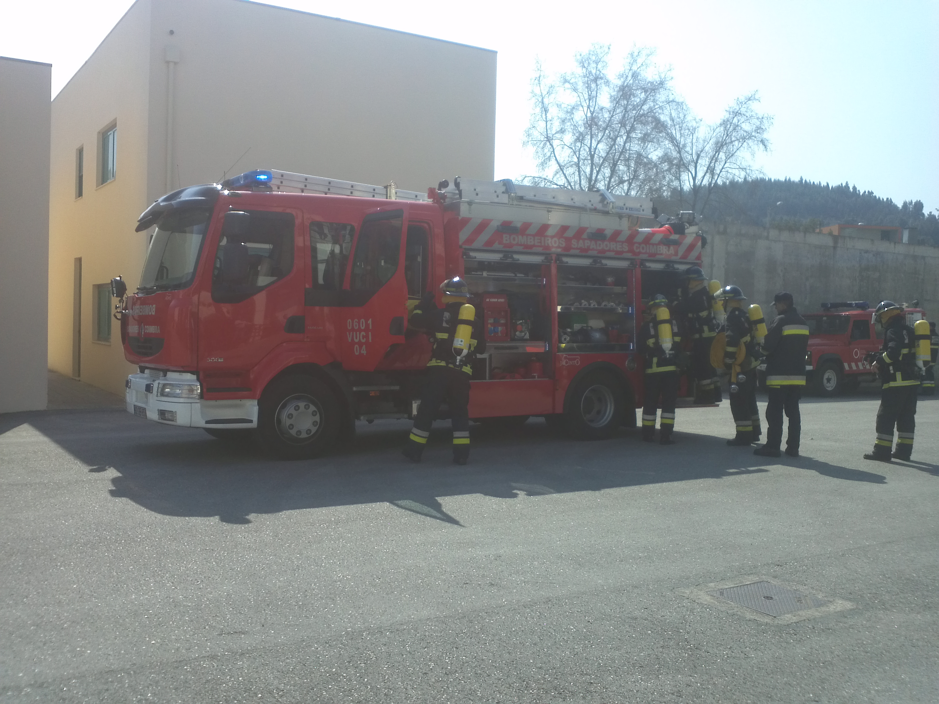 SIMULACRO01